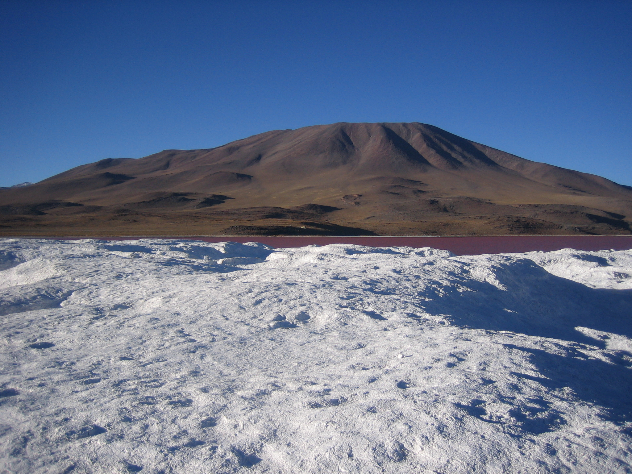 Desert Siloli, Bolivia